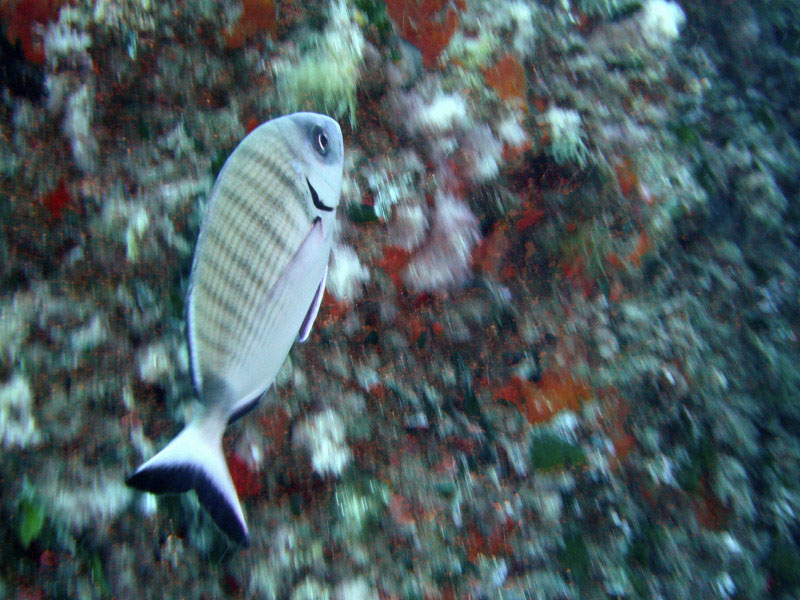 Diplodus sargus, Portofino, Italy